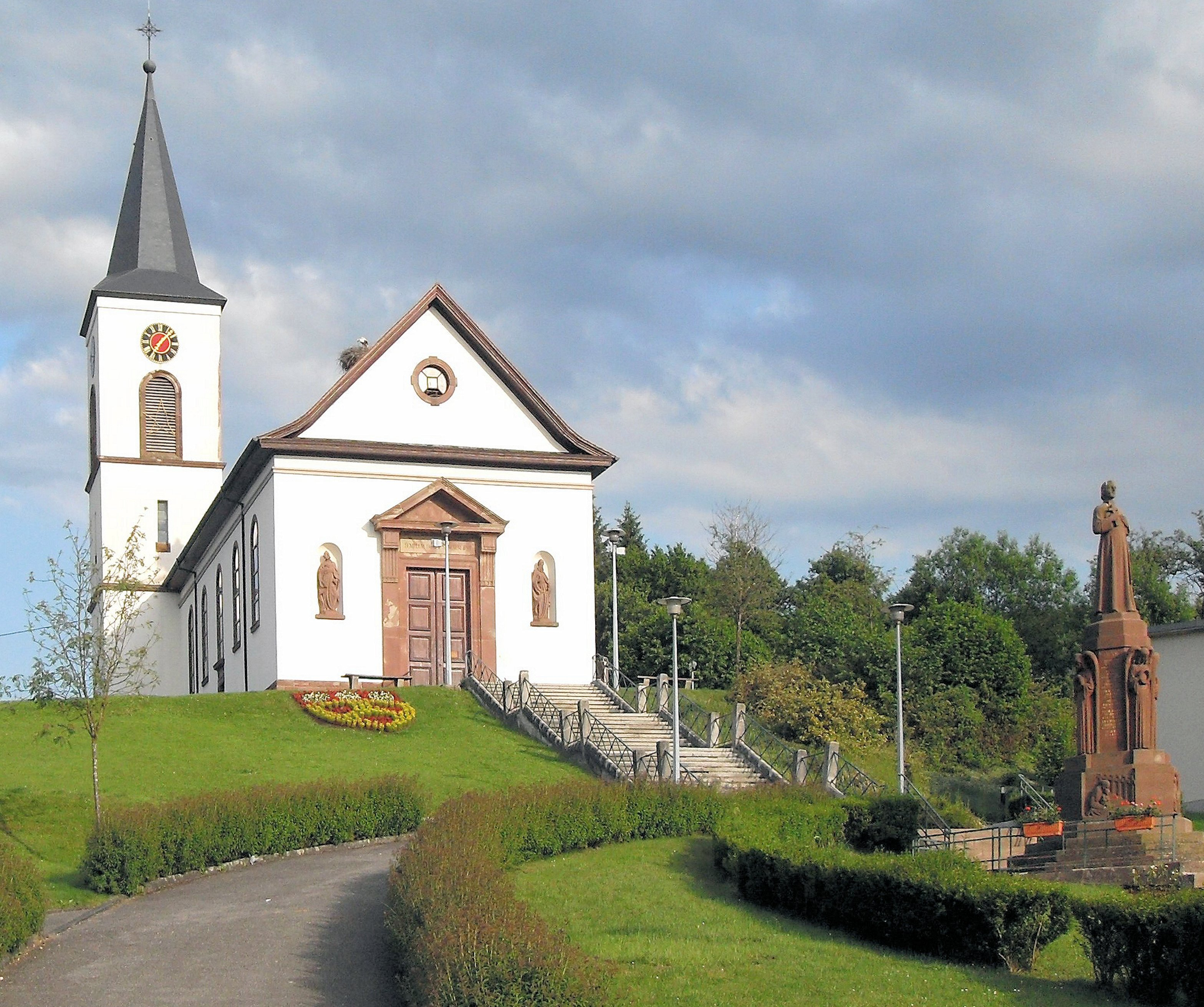 L'église Saint-Maurice à Seppois-le-Bas